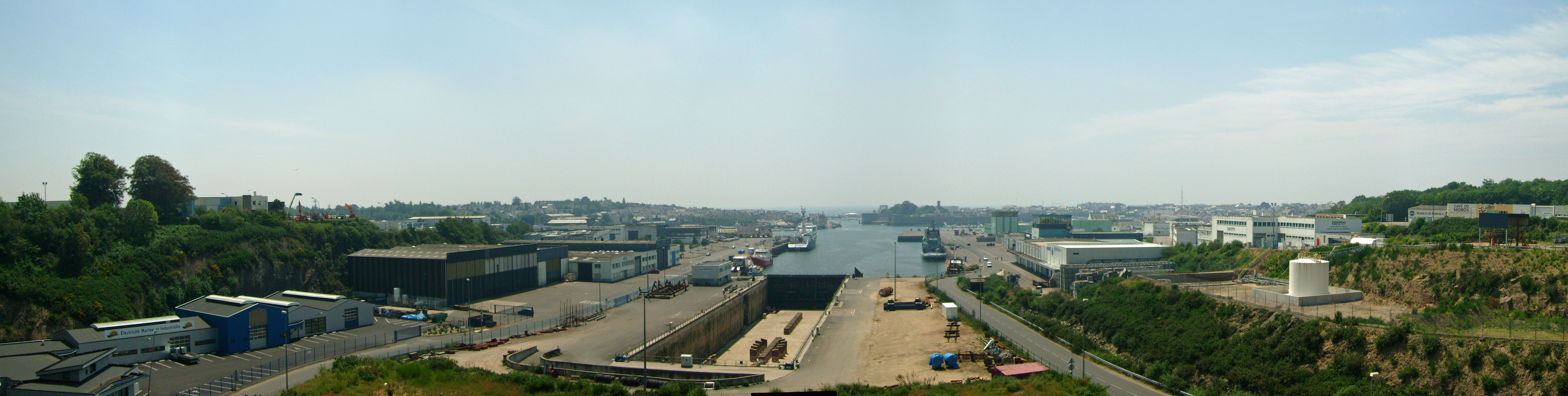 Vue du pont du Moros